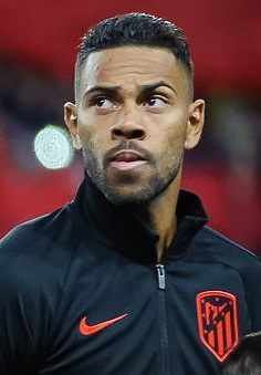 Jogadores do Atlético de Madrid em partida de 2019 contra o Lokomotiv Moscou